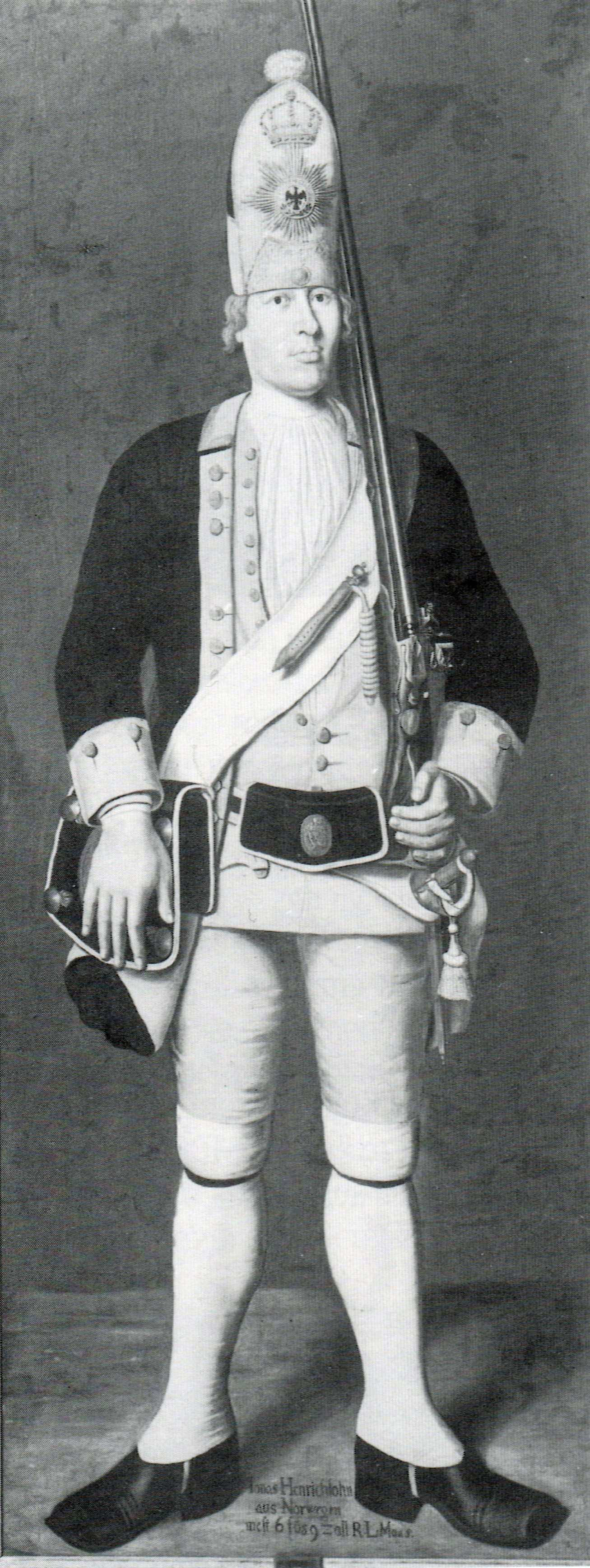 Ölgemälde von Grenadier Jonas Erikson aus Norwegen vom Roten Leibbatallion der Riesengarde Friedrich Wilhelm I.